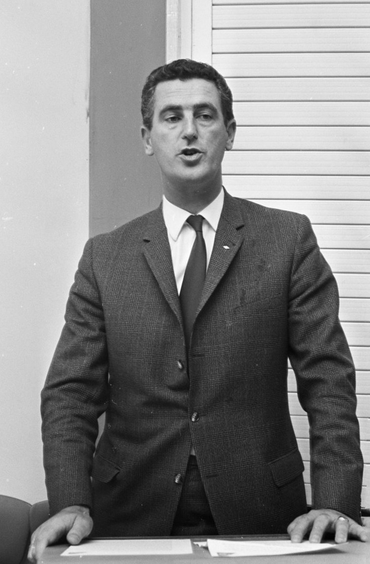 Martin Schröder (directeur Martinair) houdt een toespraak.